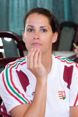 Valéria Szabó